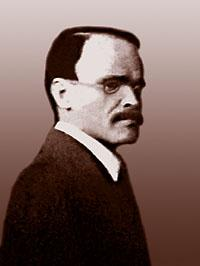 Сергій Степанович Остапенко (1881 — 1937). економіст, політичний діяч